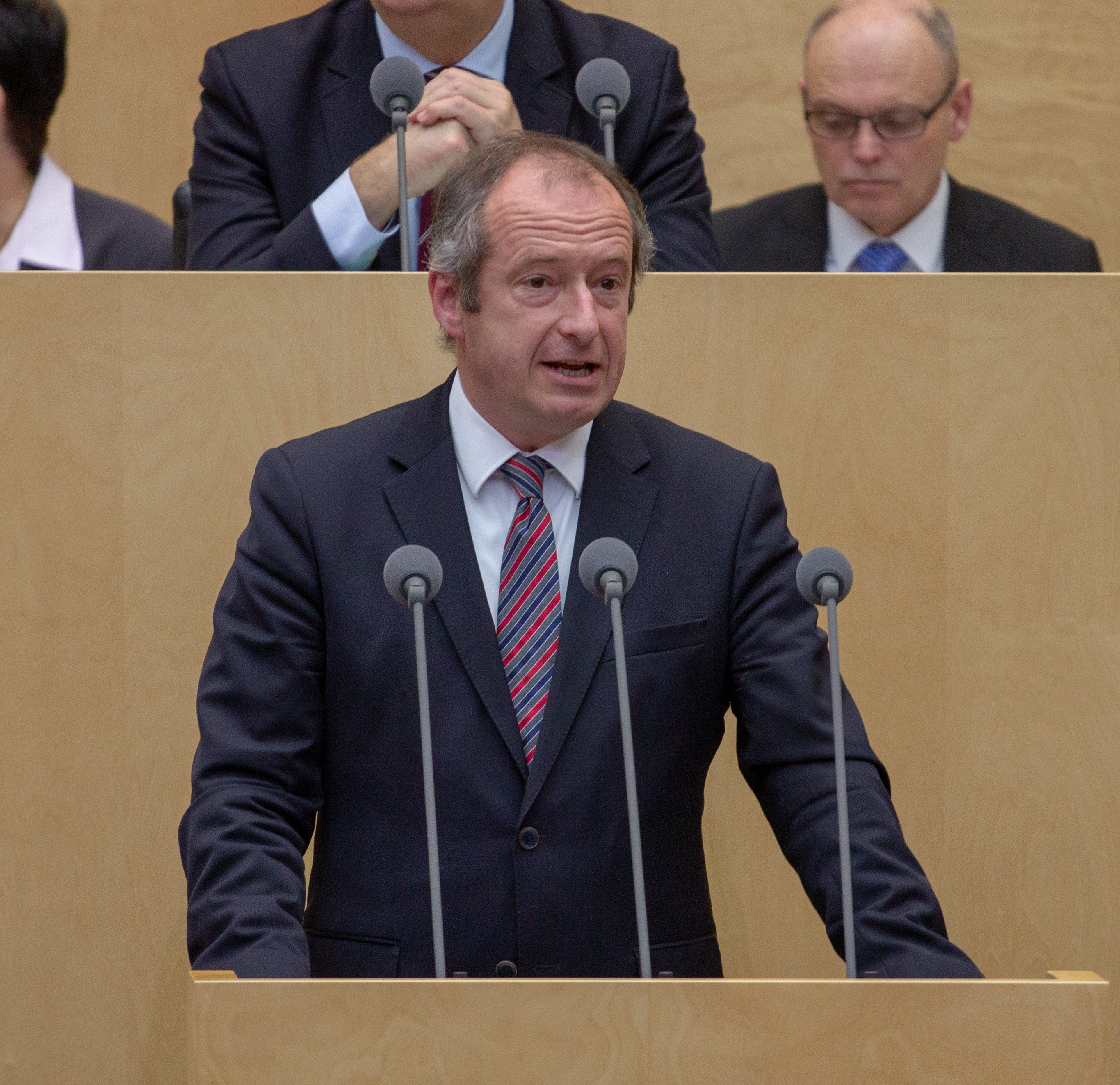 Plenarsitzung des Bundesrates am 12. April 2019 in Berlin.